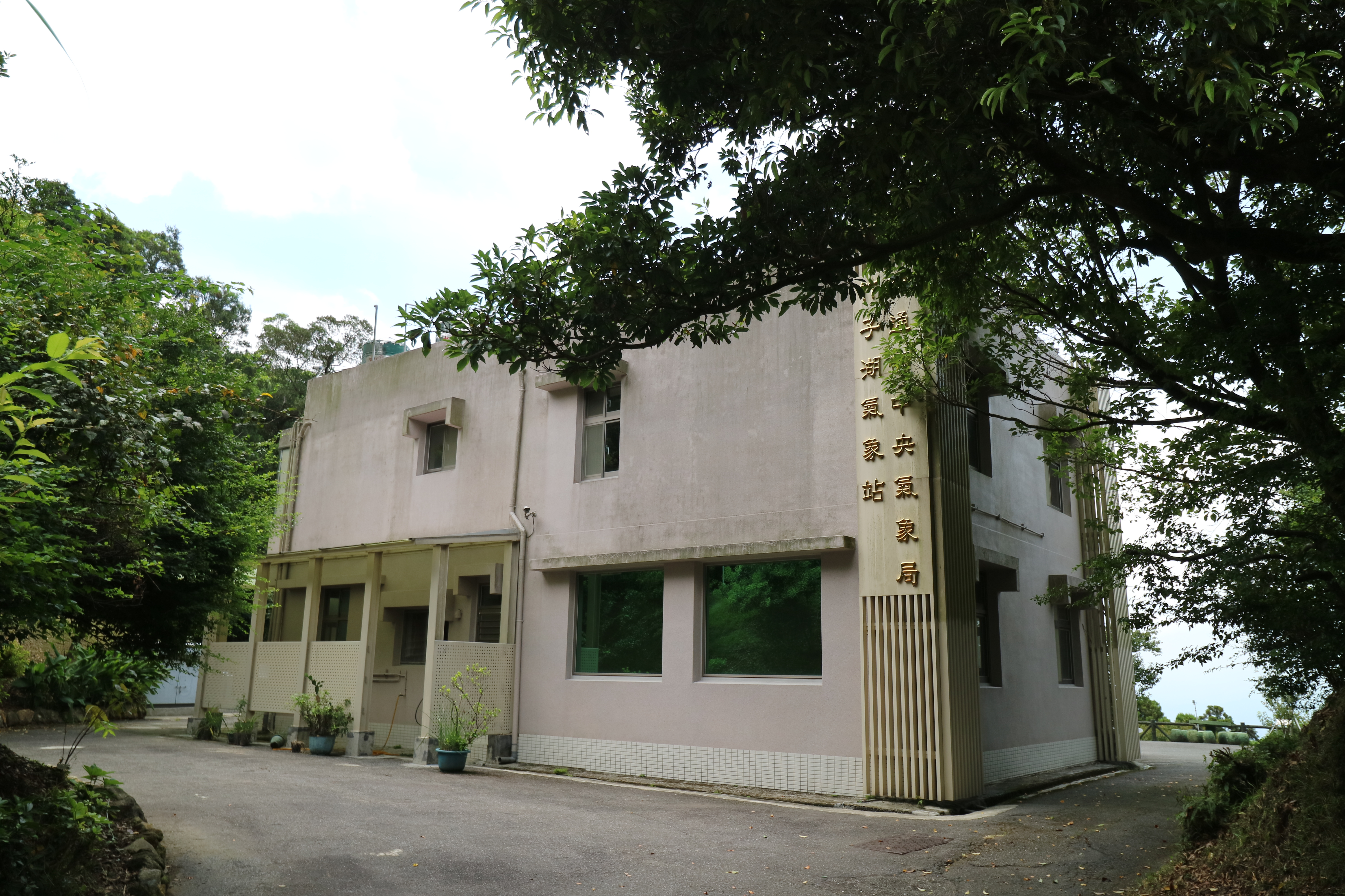 中文（台灣）: 交通部中央氣象局竹子湖氣象站